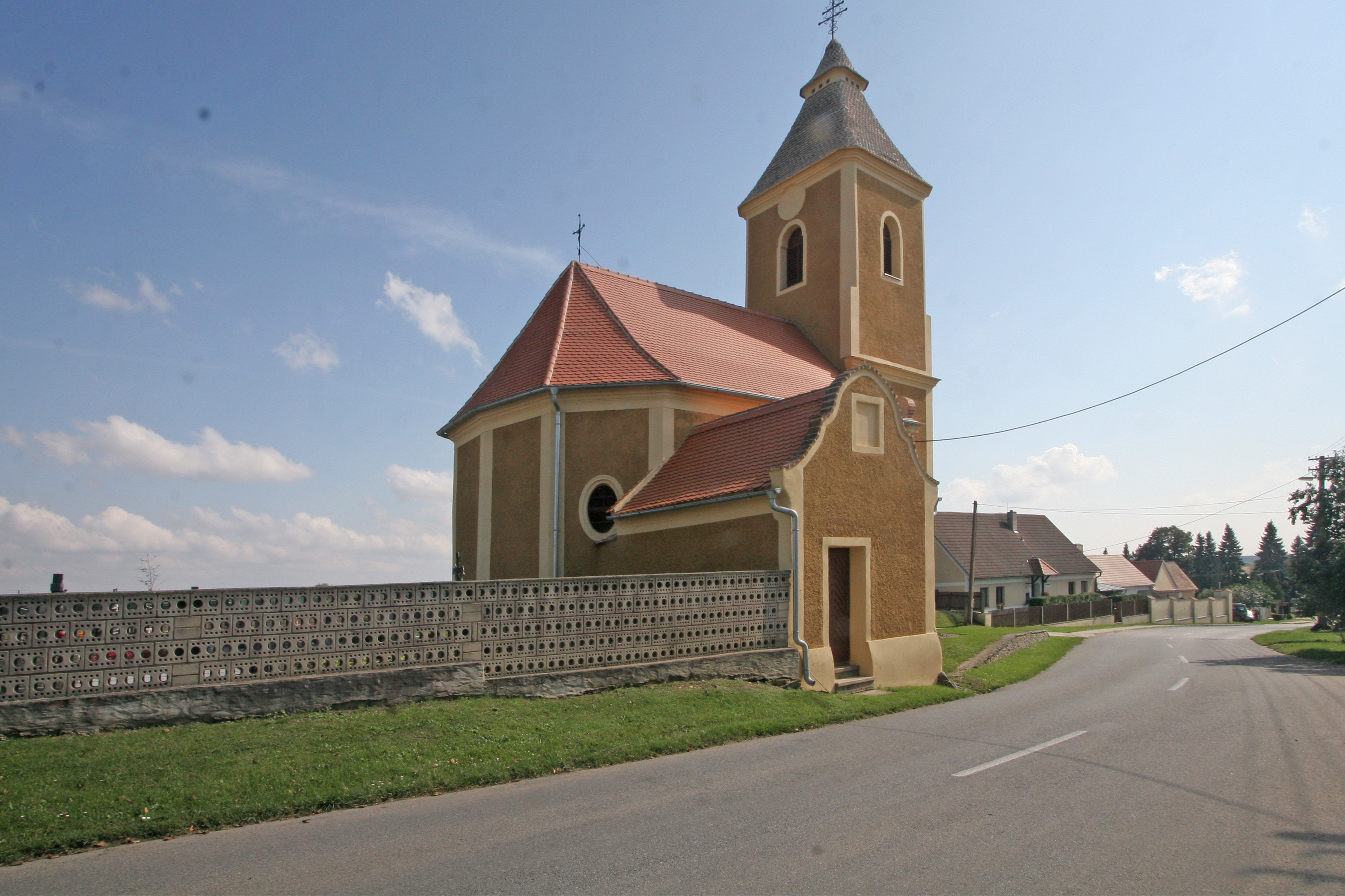 Kostel Nalezení svatého Kříže, Chvalatice.